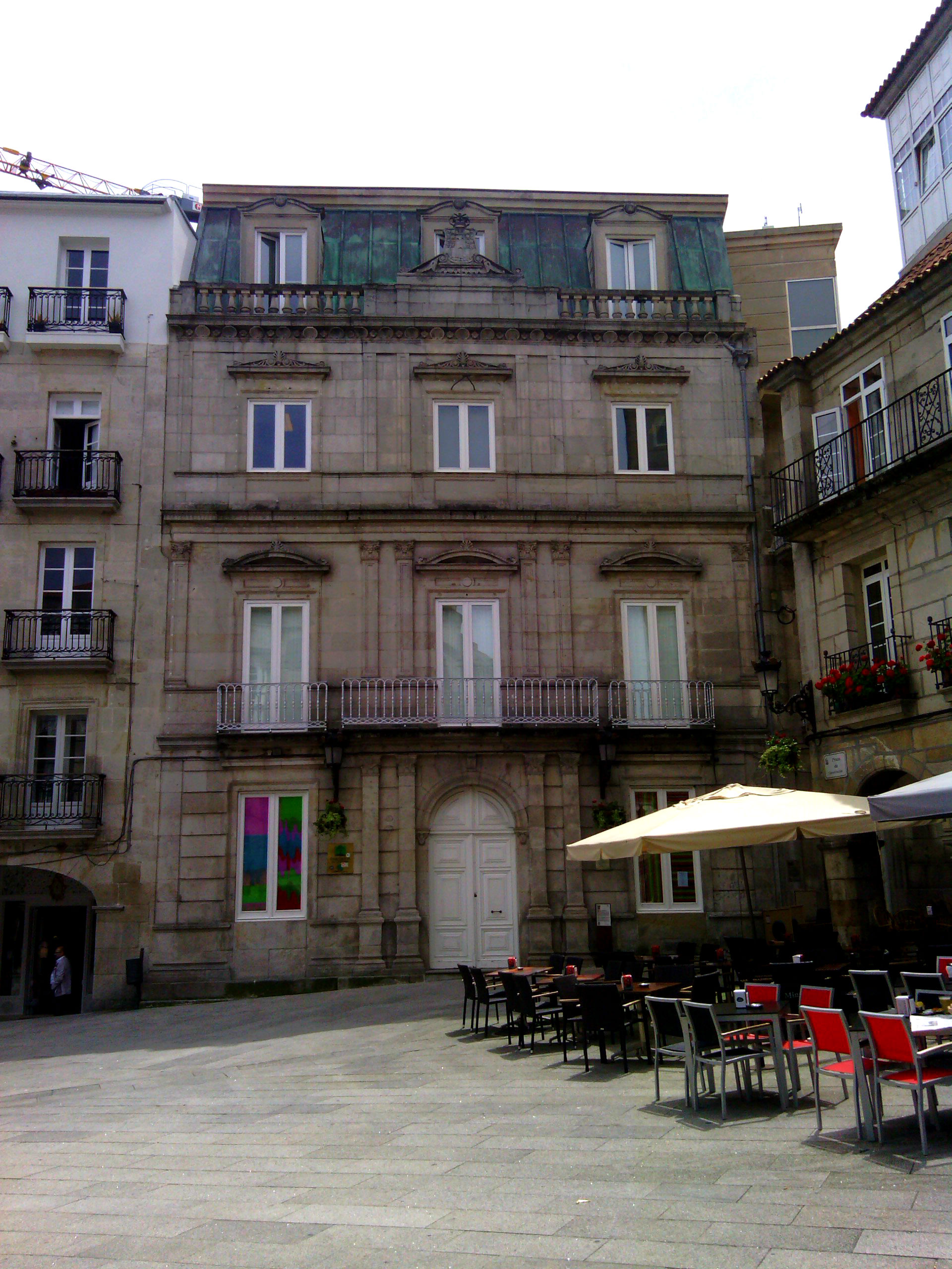 Fachada de la Casa Galega da Cultura, antiguo ayuntamiento, en la Praza da Constitución de Vigo.